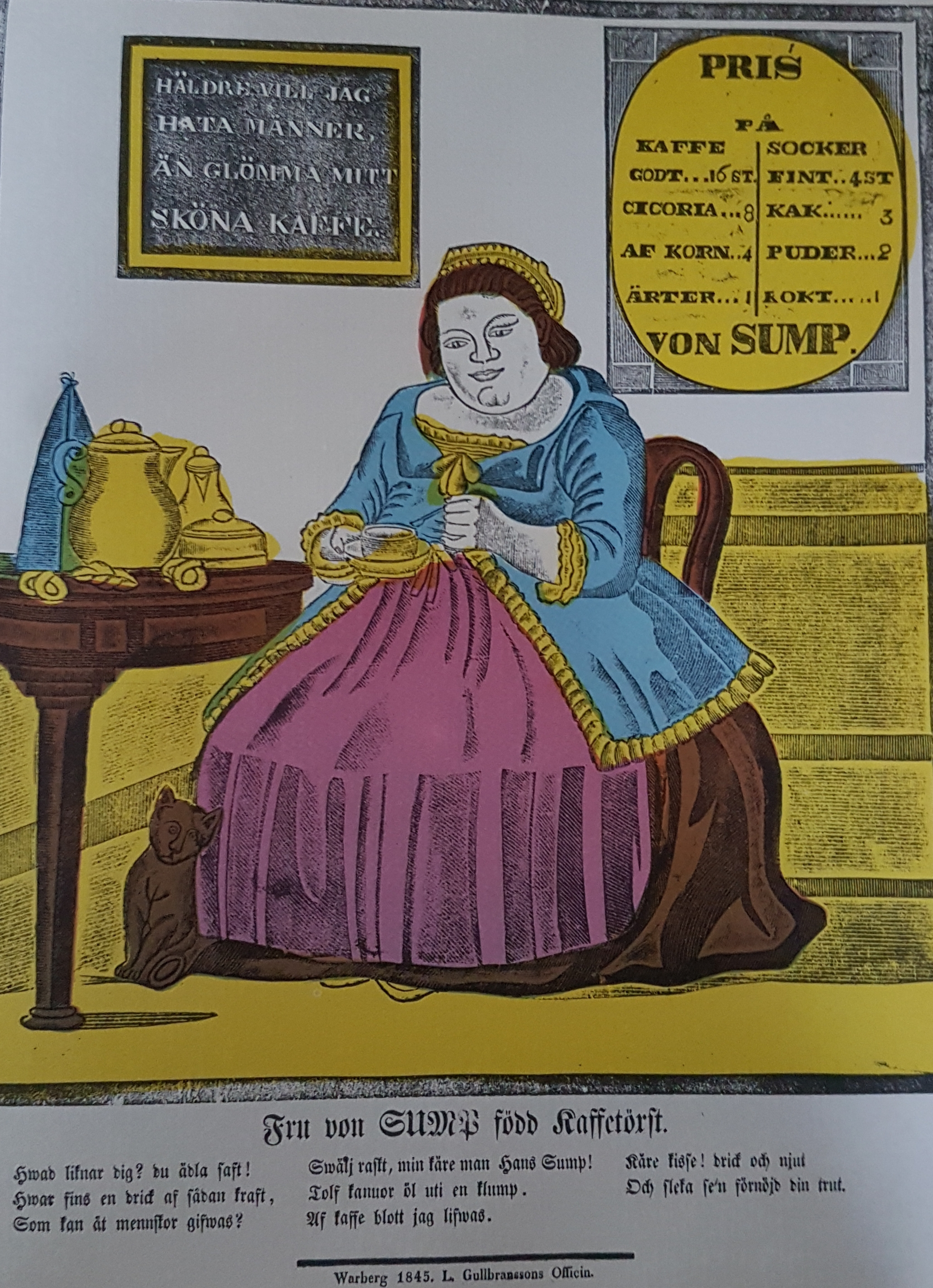 Kolorerat Kistbrev skapat av Lars Gullbransson, avfotograferad bild från Allhems Svenskt konstnärslexikon.